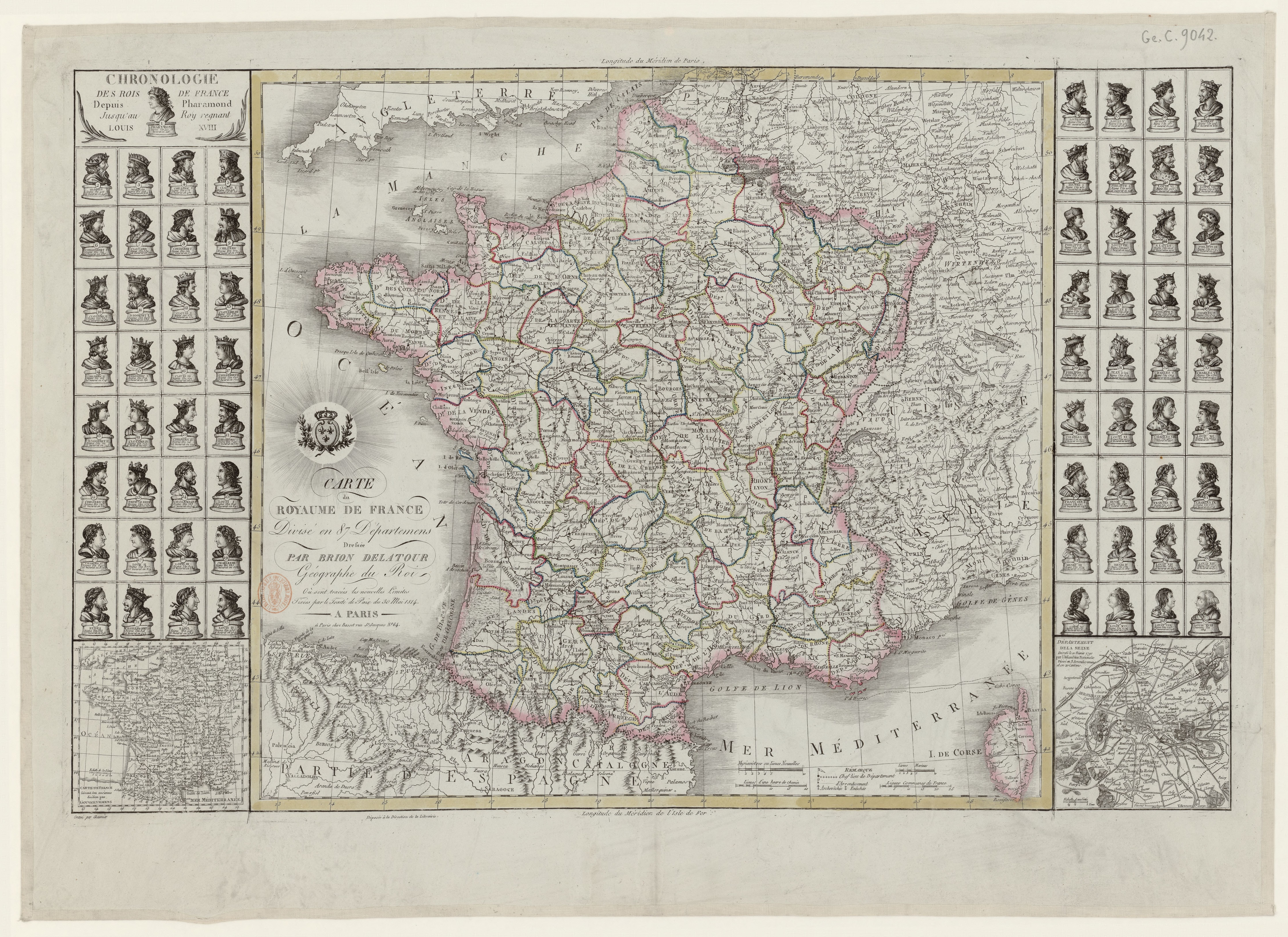 Carte du royaume de France divisé en 87 départemens / dressée par Brion de la Tour..., où sont tracées les nouvelles limites fixées par le traité de paix du 30 mai 1814 ; Gravé par Chaumier.